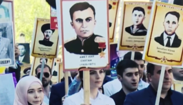 Акция «Бессмертный полк» в Махачкале 9 мая 2016 года